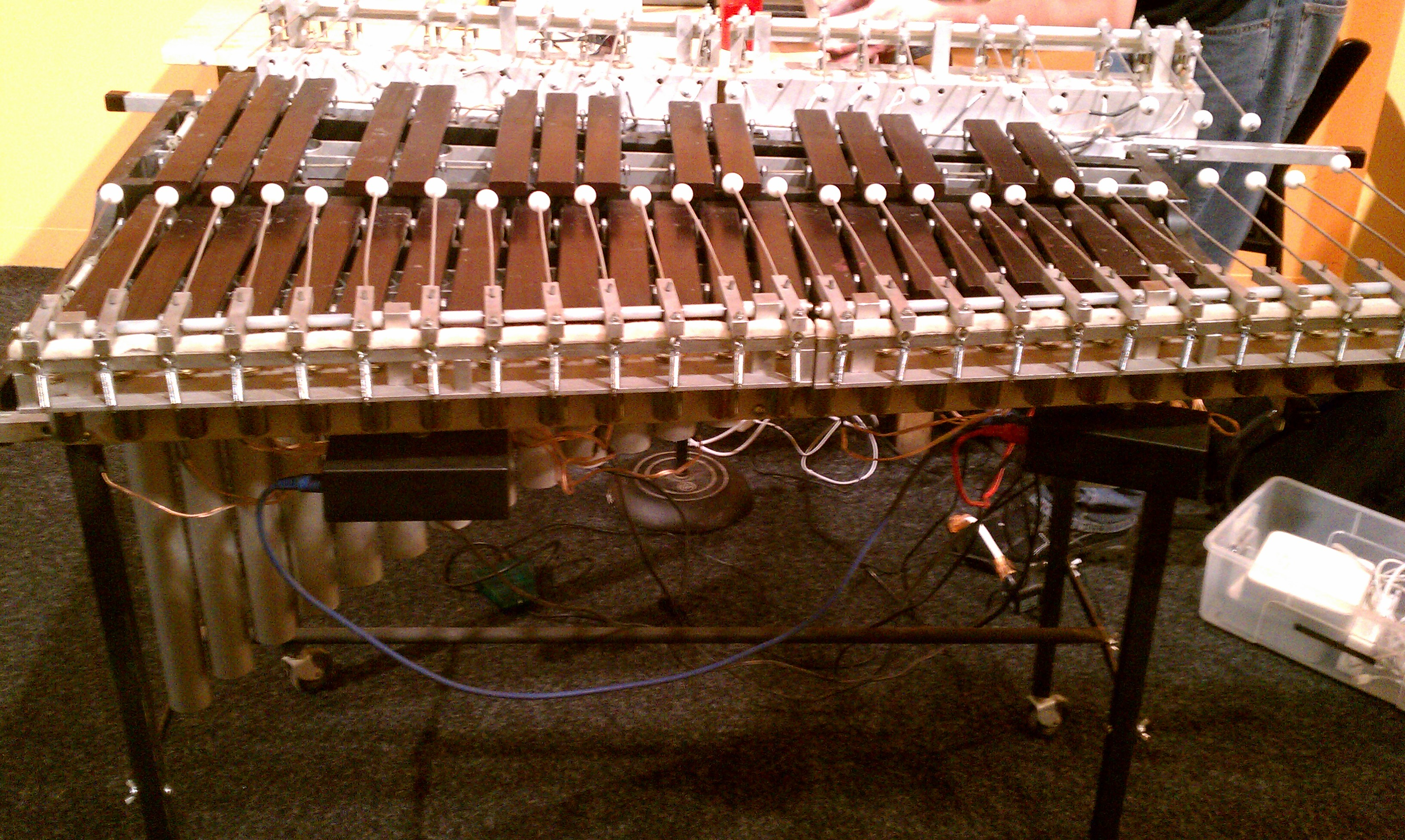 IMAG0304.jpg